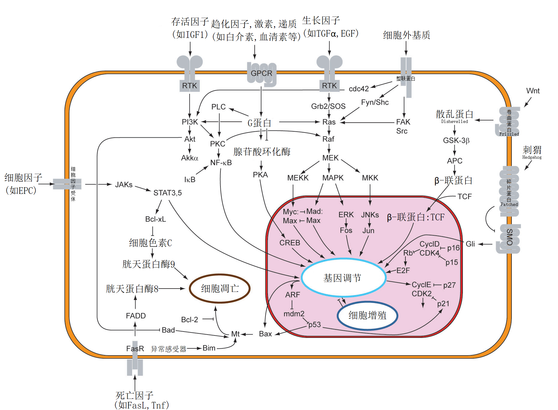 基于en:Image:Signal_transduction_pathways.jpg，由en:User:Roadnottaken发布到公共领域